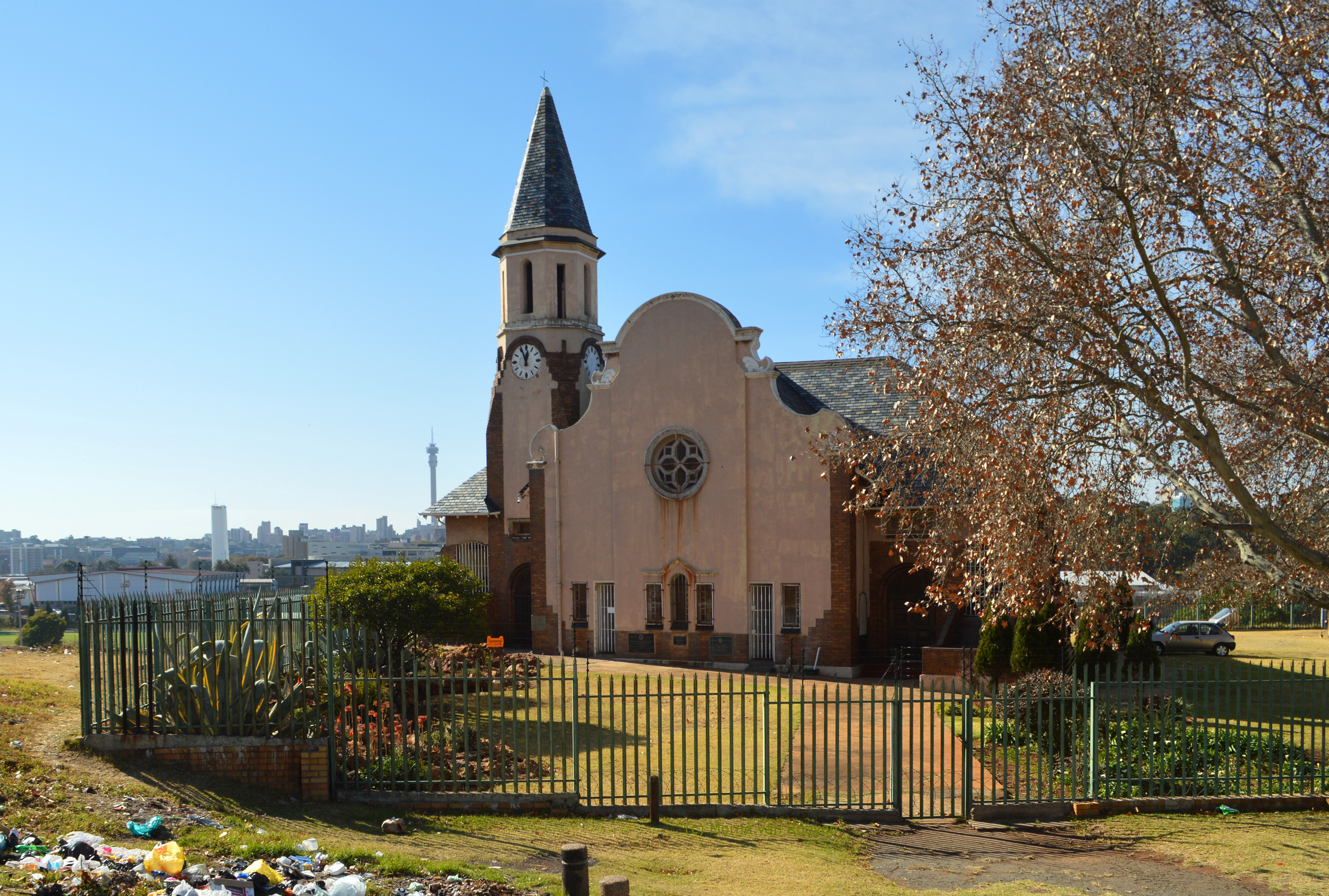 Die kerkgebou van die Nederduitsch Hervormde gemeente Johannesburg, Vrededorp